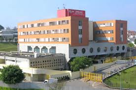 Hospital Grajau